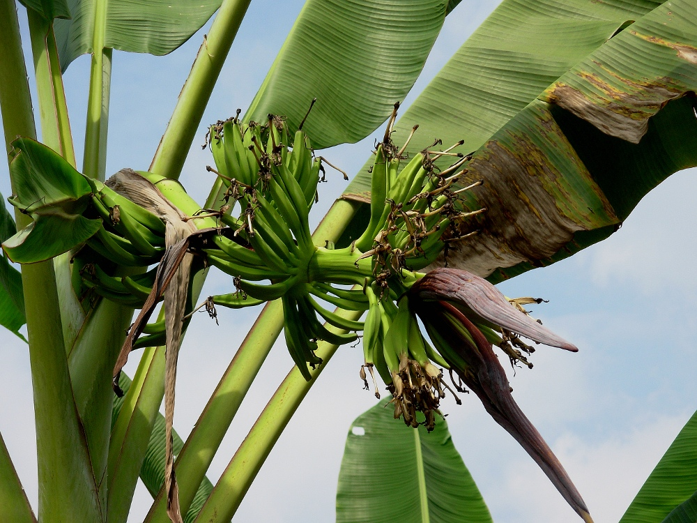 ചുണ്ടില്ലാക്കണ്ണൻ / കൂമ്പില്ലാക്കണ്ണൻ (കൂമ്പ് മുഴുവൻ വിരിഞ്ഞ് കുലയാകുന്നു)